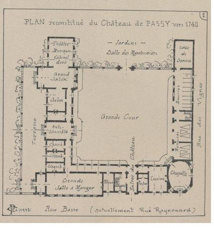 Plan du château de Passy (château de Boulainvilliers, aujourd'hui détruit), établi vers 1740.